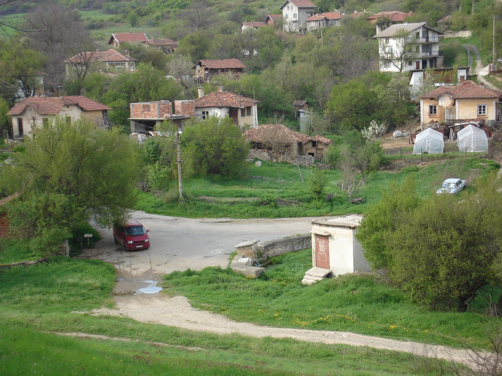 Центърът на с. Чепърлянци. На преден план - селските чешми.